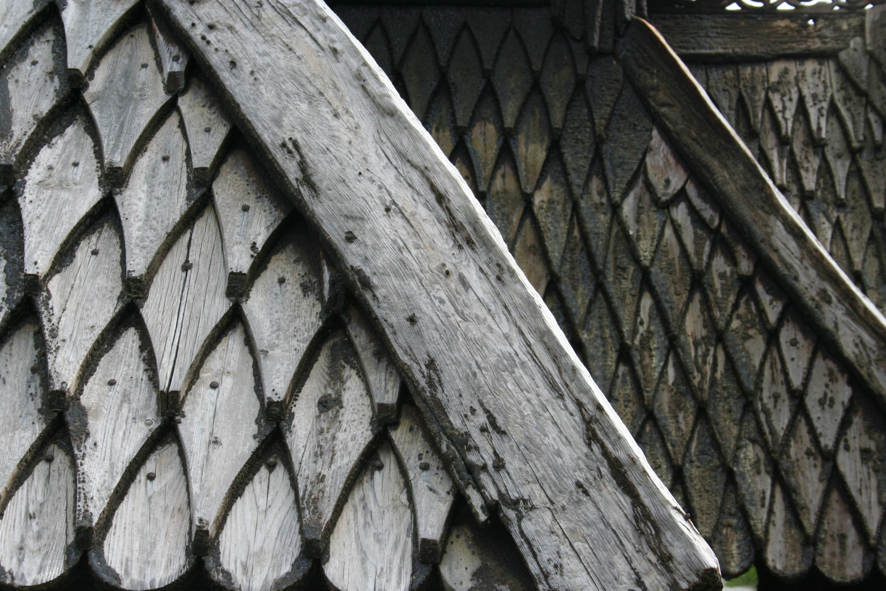 Borgund Stabkirche Dach